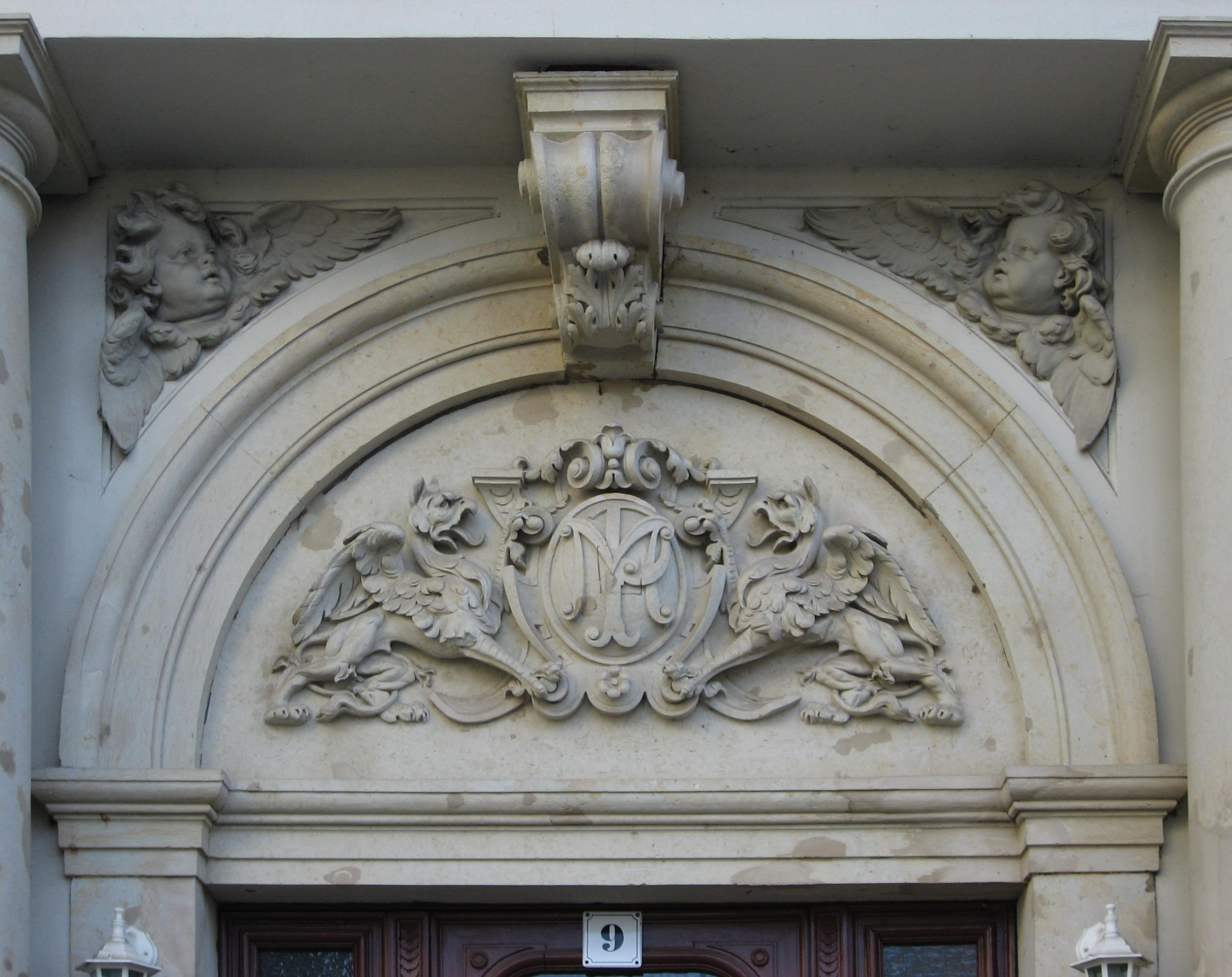 Leipzig, Eingang des Wohnhauses Hillerstraße 9, erbaut 1885 von Max Pommer